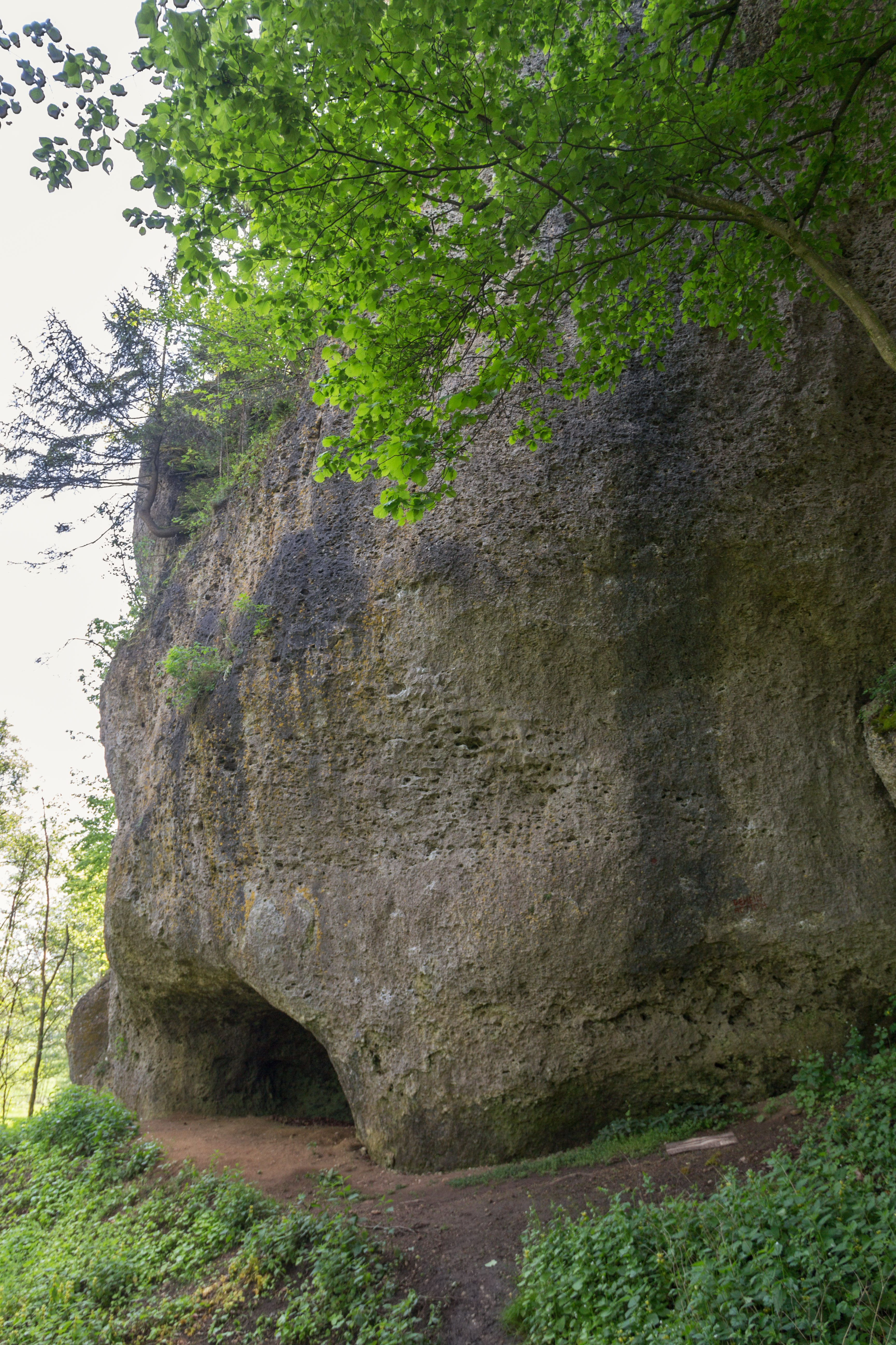 Guckerlochfelsen mit Höhlen, Geotop, Naturdenkmal, Naturpark Fränkische Schweiz-Veldensteiner Forst, Michelfeld, Auerbach i.d.OPf.